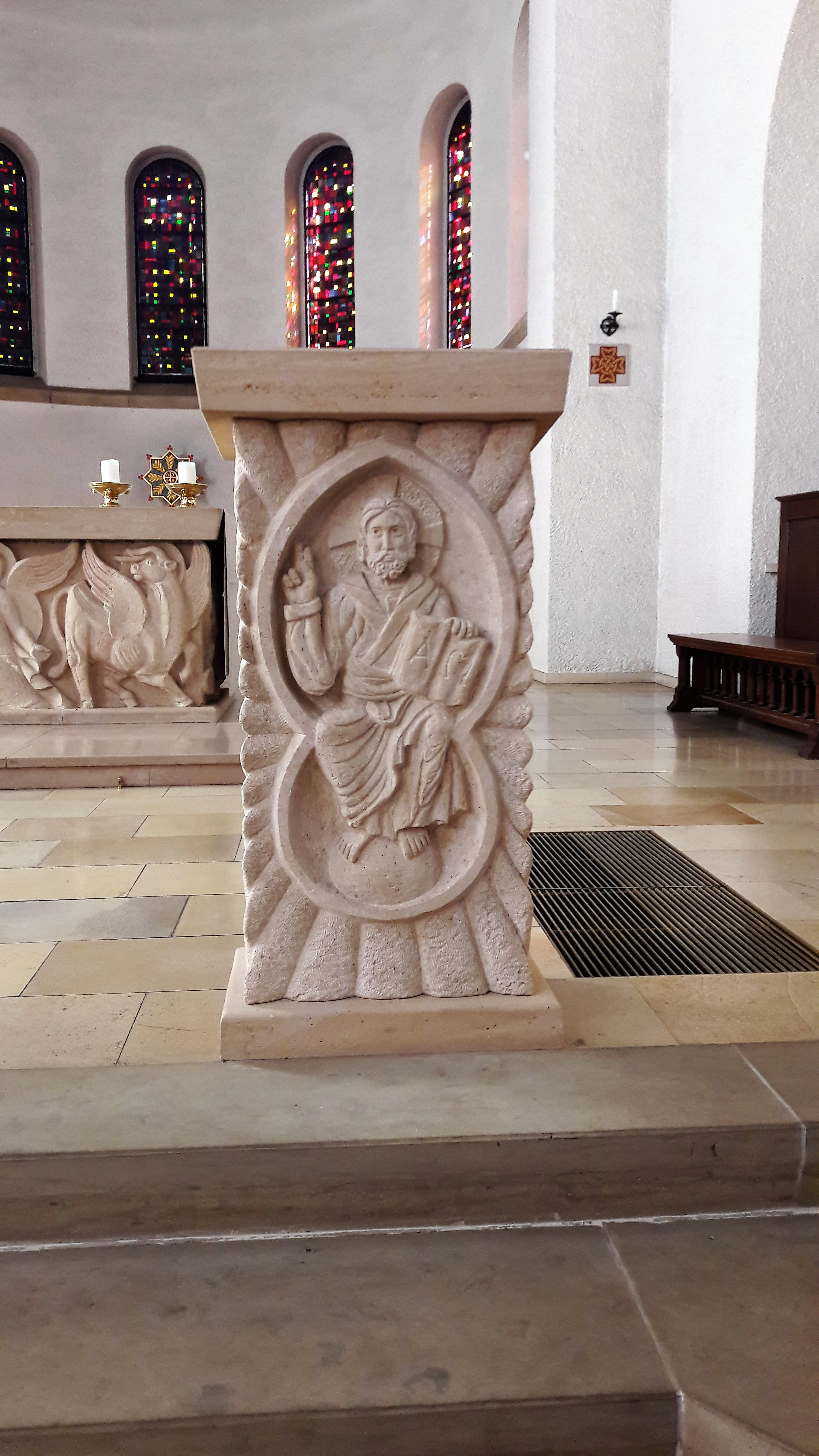 Liespult an der Benediktinerabteikierch zu Klierf